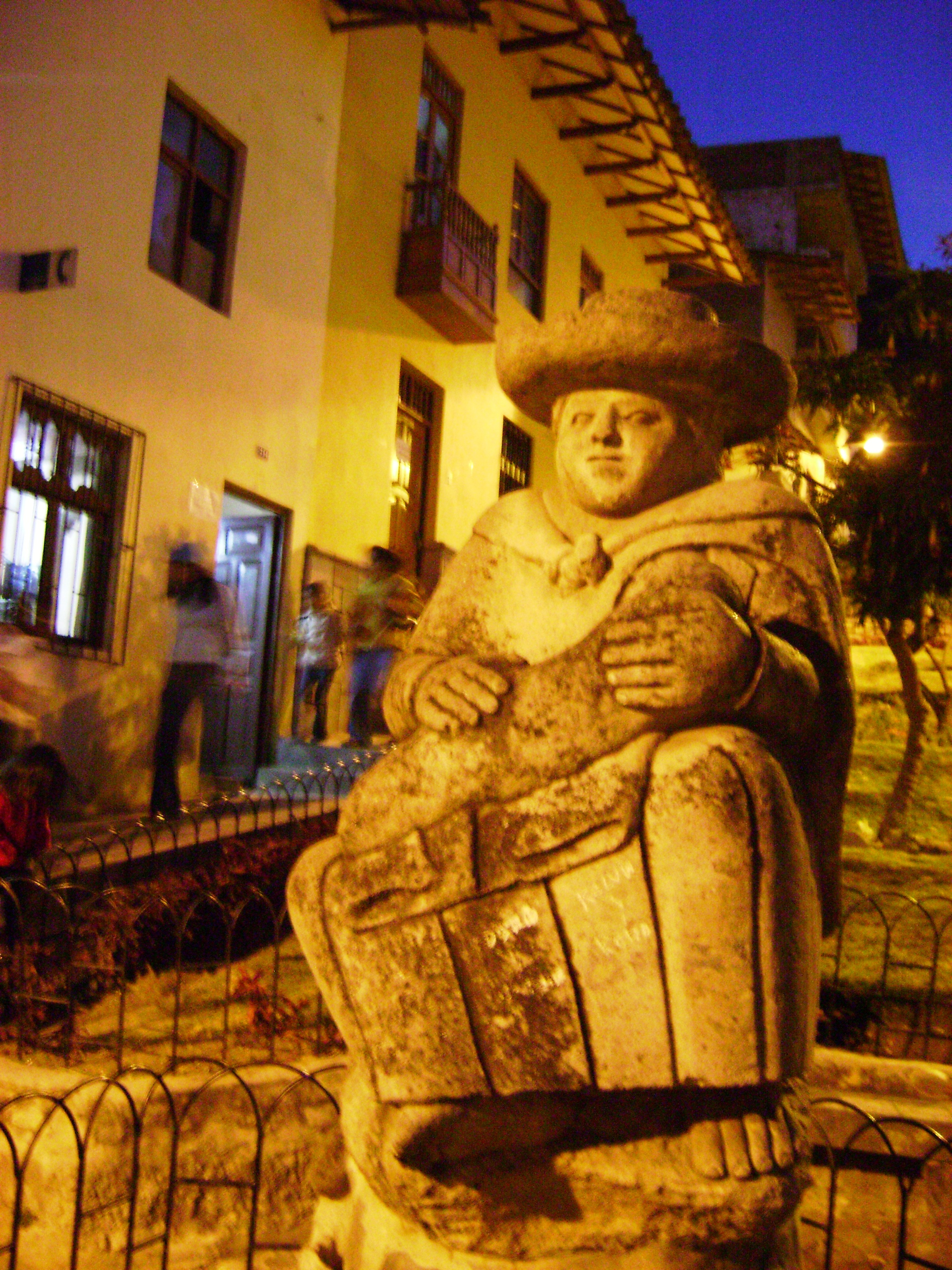 Guitarrista de piedra en la subida al cerro Santa Apolonia. Cajamarca, Perú.